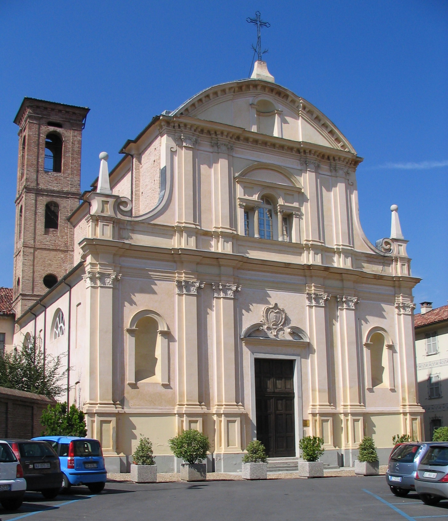 asti ex chiesa di San Giuseppe. Foto fatta da me faber 2006.